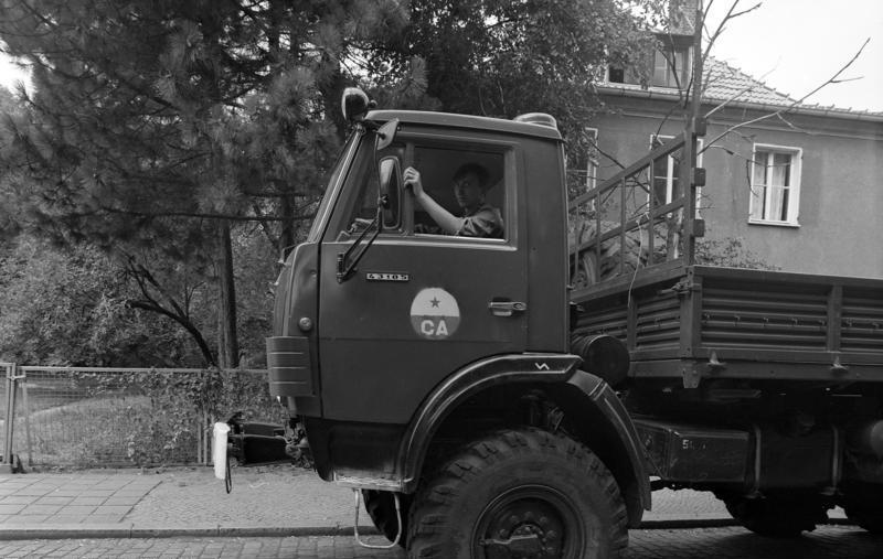 11.-18.8.1991 Bundesland Sachsen-Anhalt